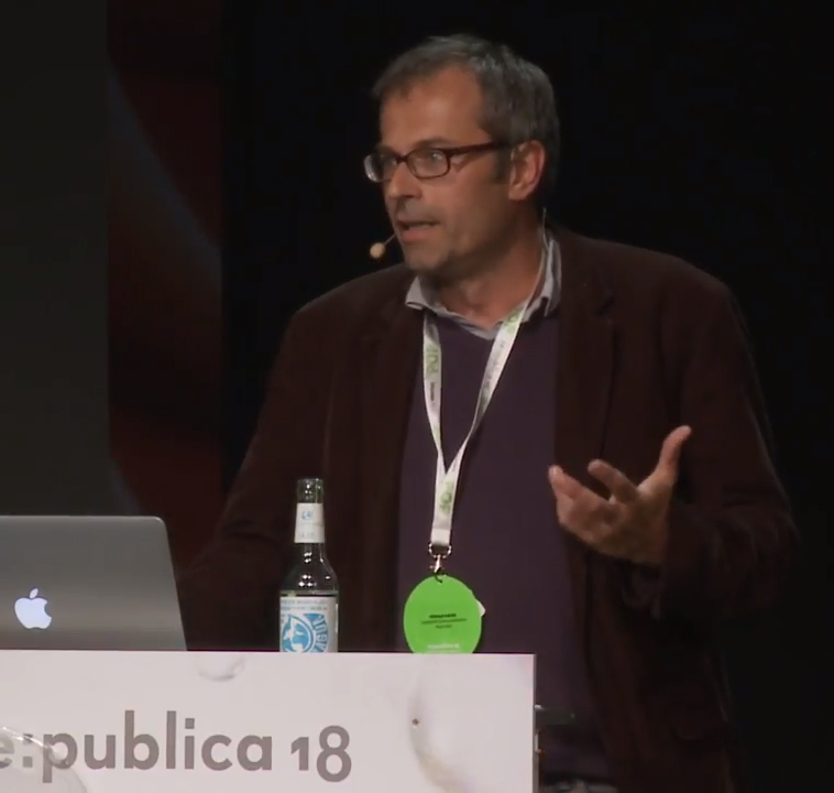 Stephan Kaiser ist seit dem Jahr 2009 Inhaber des Lehrstuhls für ABWL, Personalmanagement und Organisation und im Vorstand des Instituts für Entwicklung zukunftsfähiger Organisationen an der Universität der Bundeswehr München.